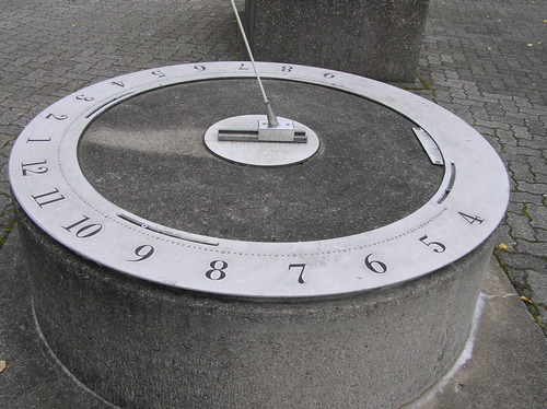 Foster-Lambert-Sonnenuhr in Muttenz/Basel-Land